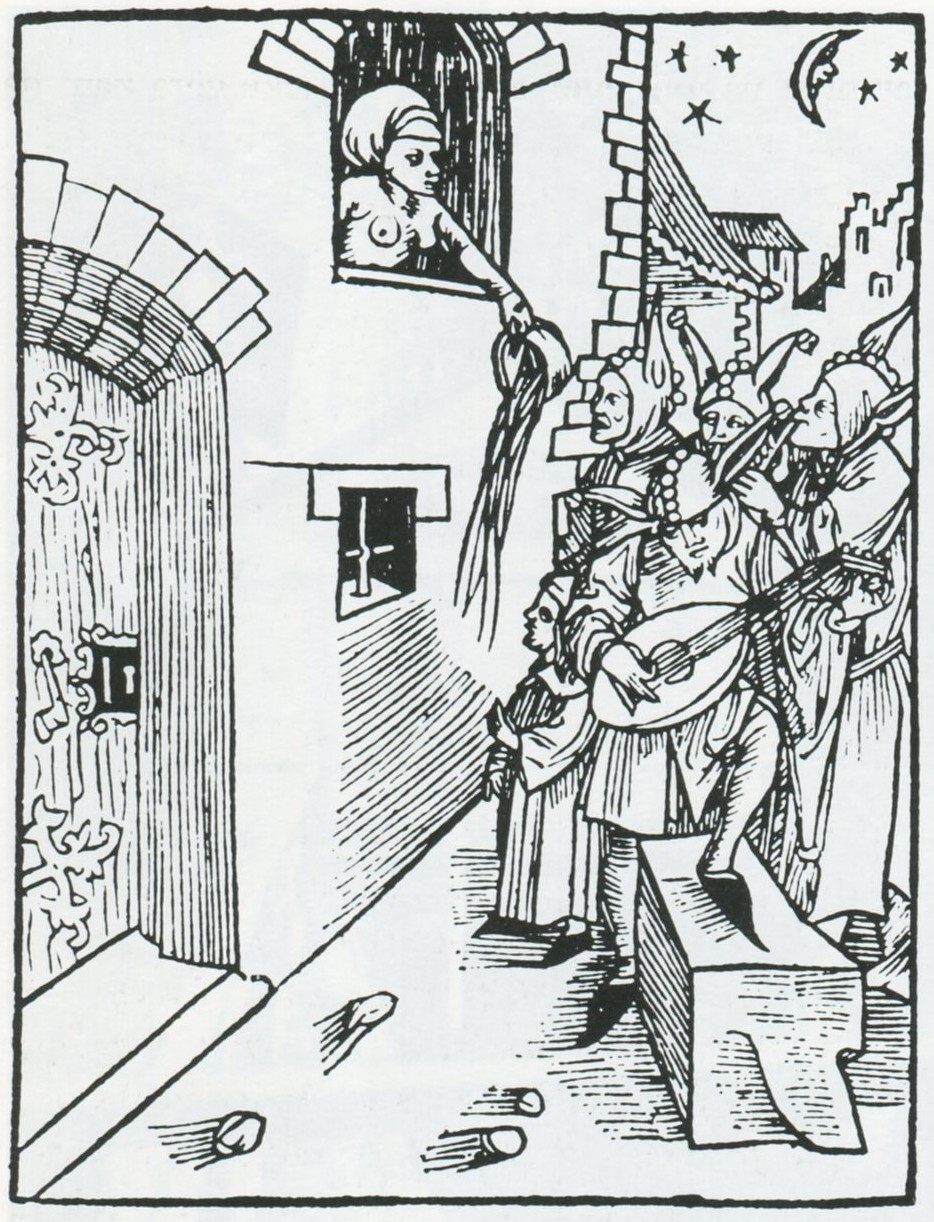 Medeltida latrintömning genom fönstret